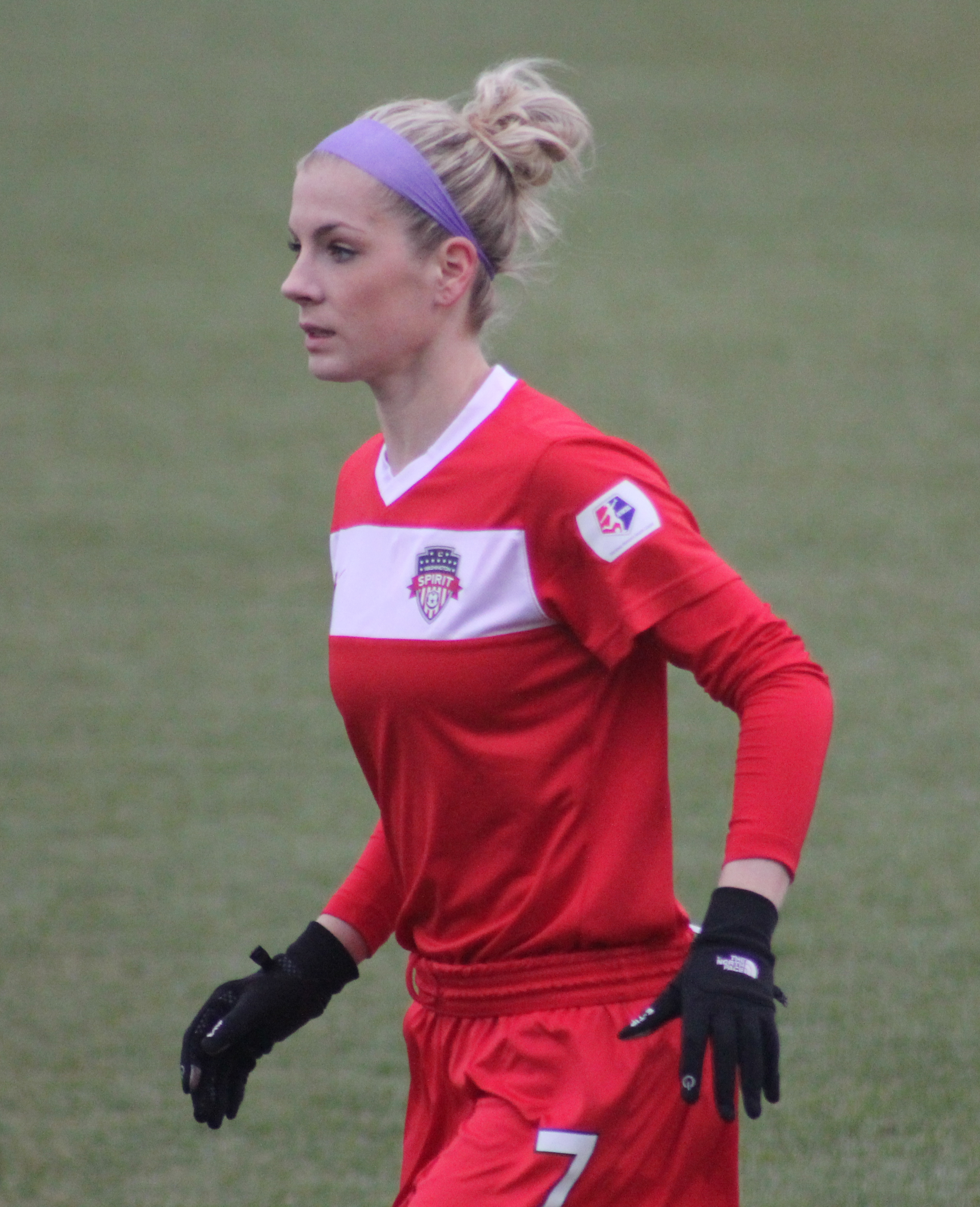 Megan Mischler (Washington Spirit)